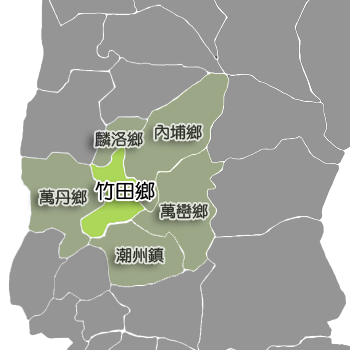 屏東縣竹田鄉相對位置。